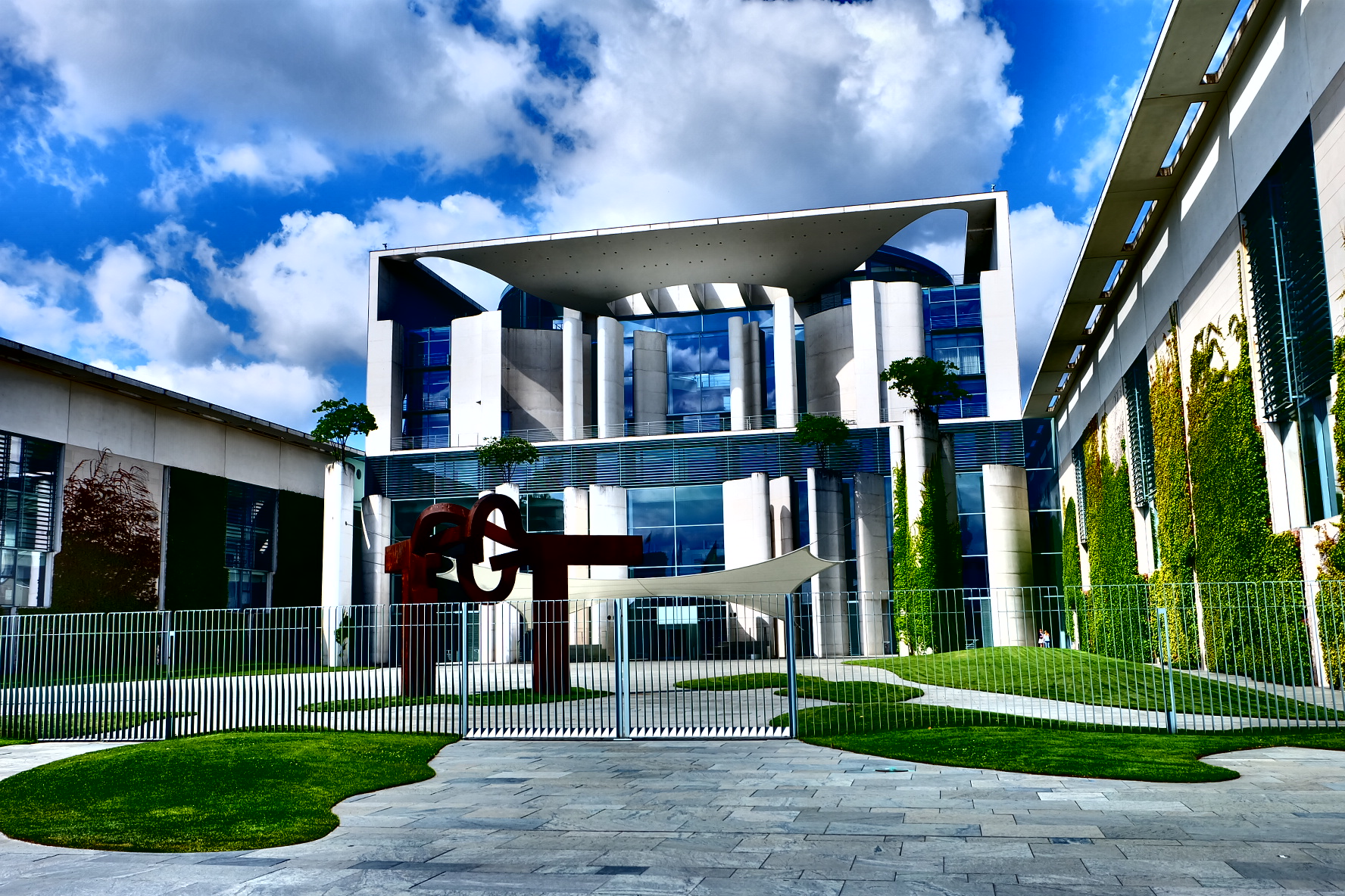 Kanzleramnt